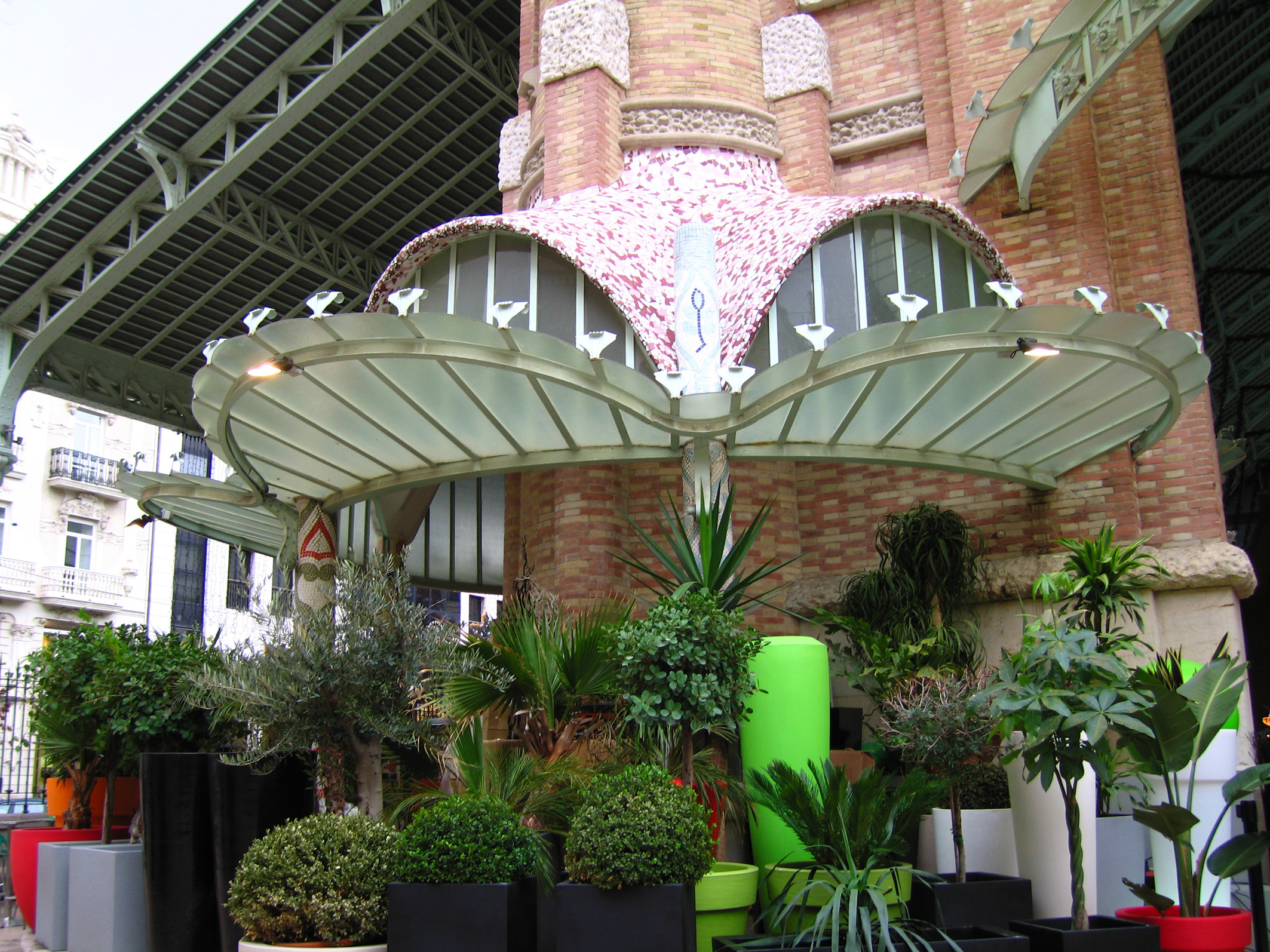 Trencadís a la façana del Mercat de Colom (València)